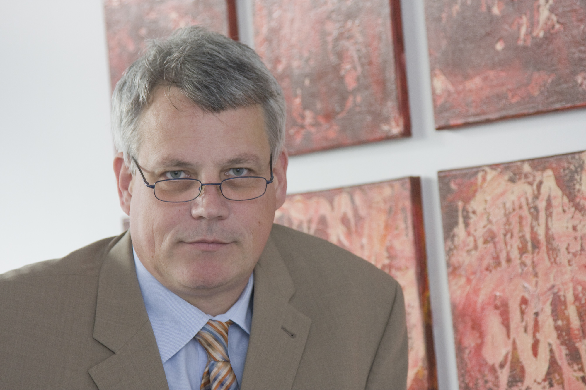 Knut Gerschau